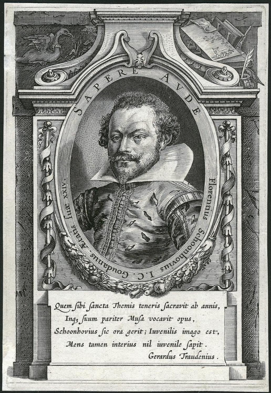 Gravure van Florentius van Schoonhoven uit Gouda